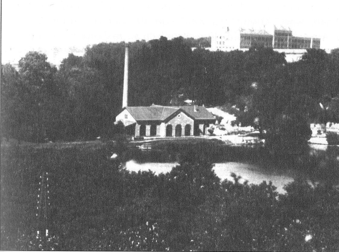 der Deutschmühlenweiher um 1900 mit Pumpstation des Wasserwerks